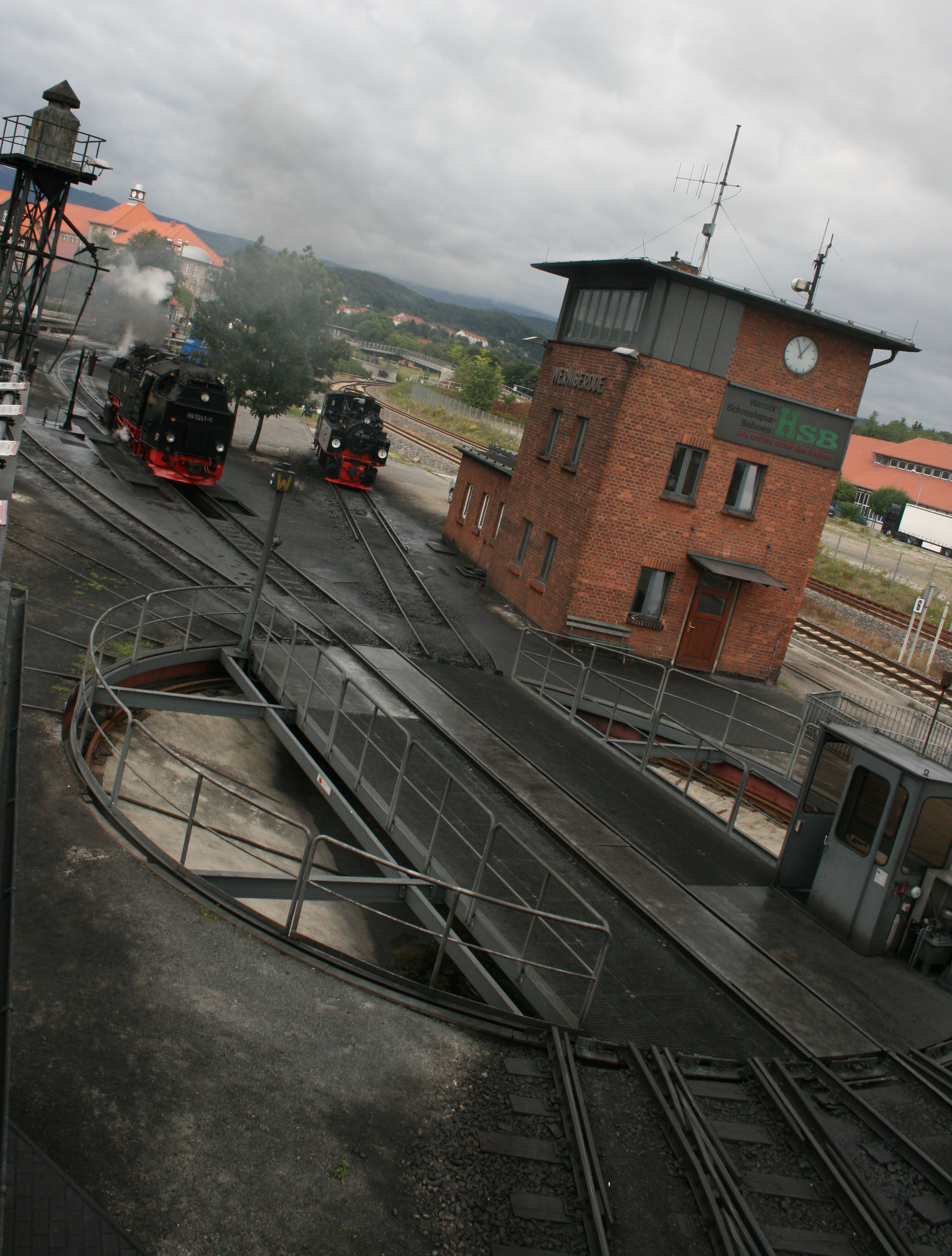 Draaiplatform HSB Wieringerode